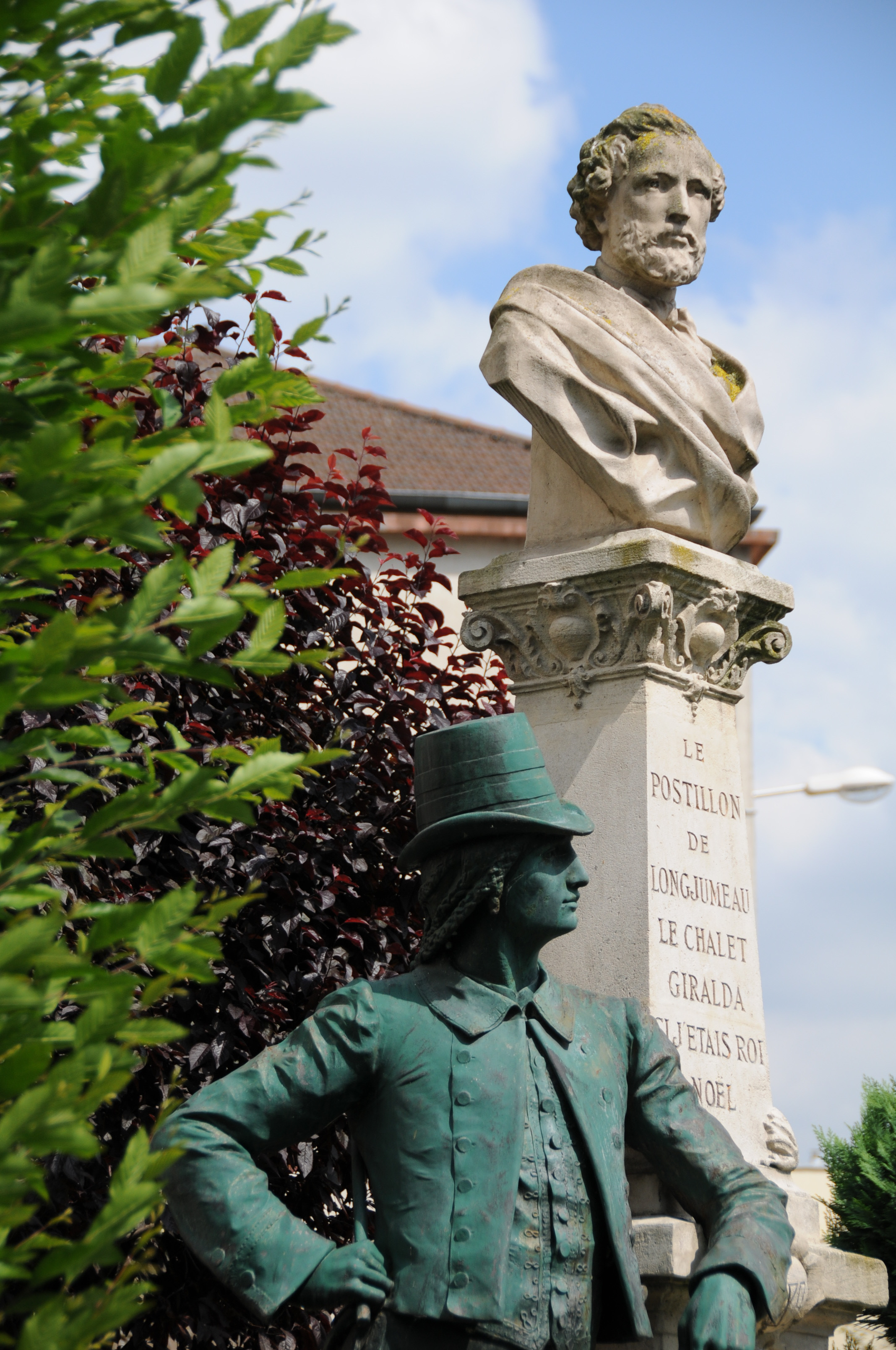 Longjumeau